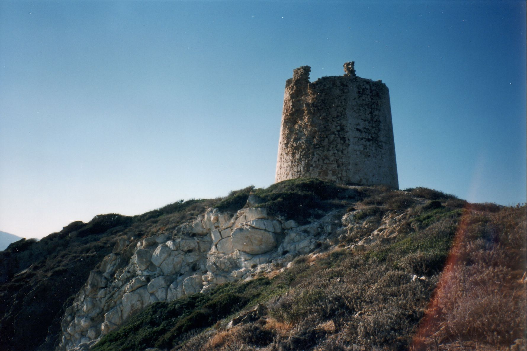 Torre costiera della Sardegna